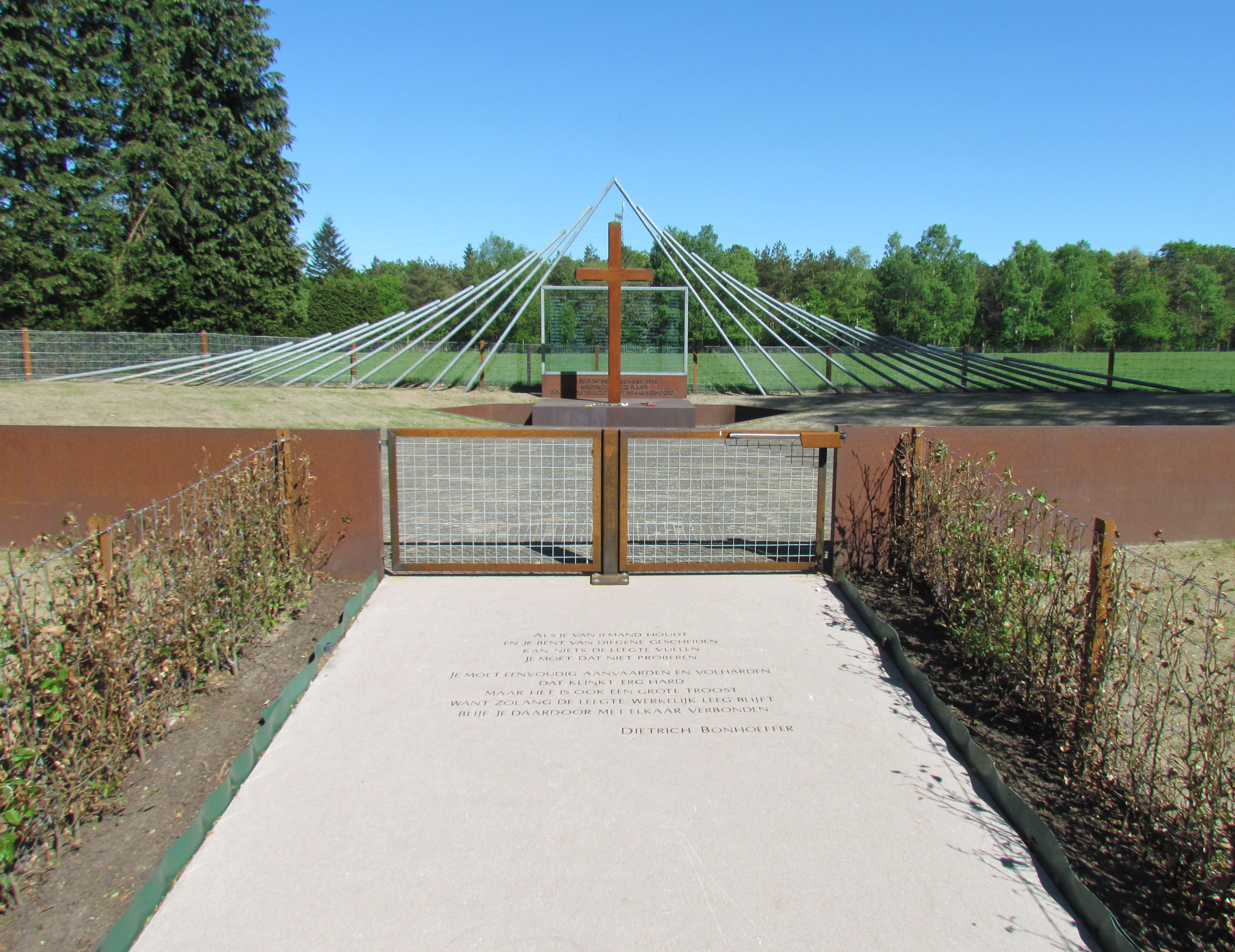 Het monument te Woeste Hoeve. Nieuw in 2018 zijn de tuinhekjes aan weerszijden van de plaat met Bonhoeffers gedicht, en het toegangshek